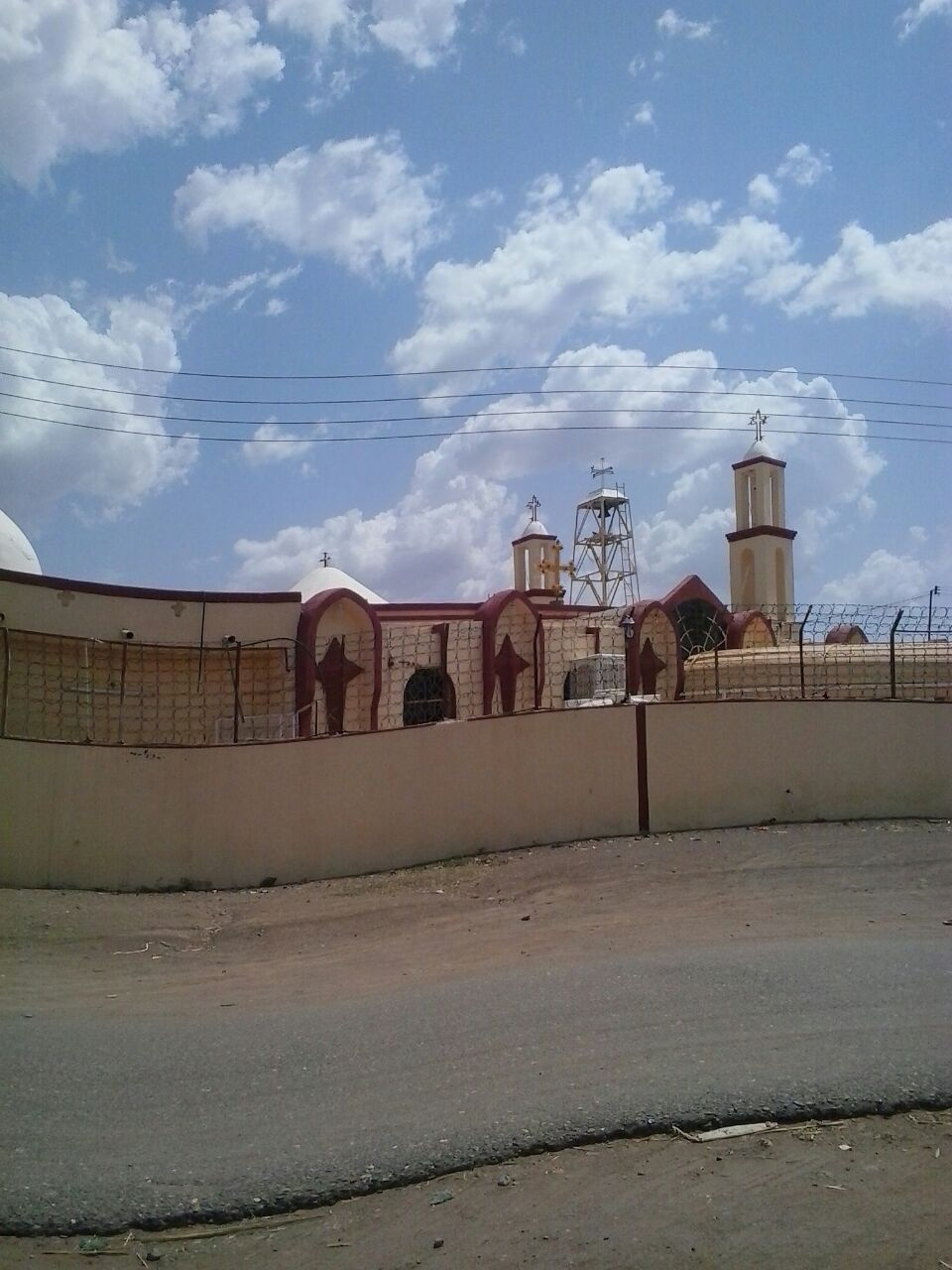 churches